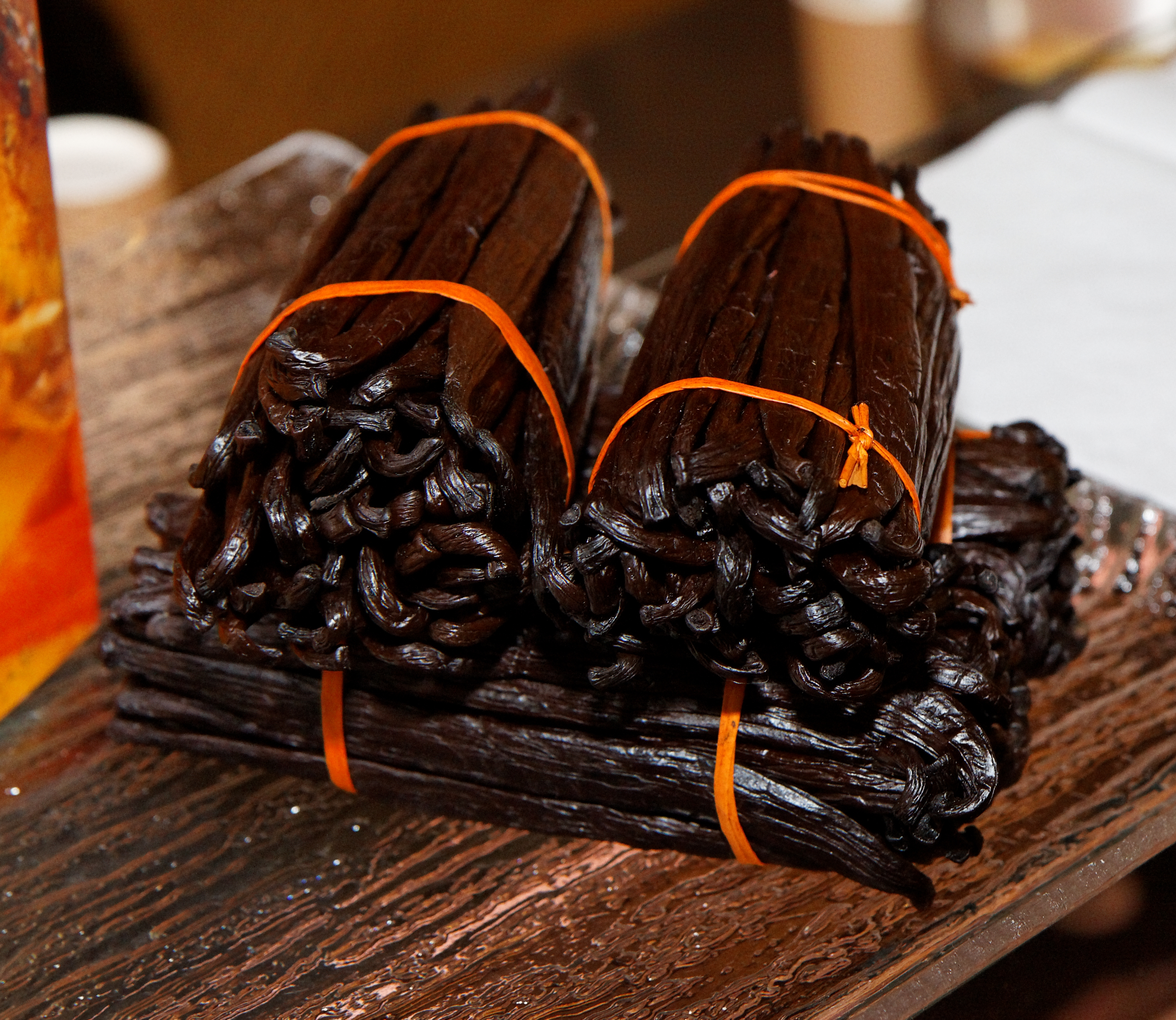 Le salon de l'agriculture de Paris en 2011.